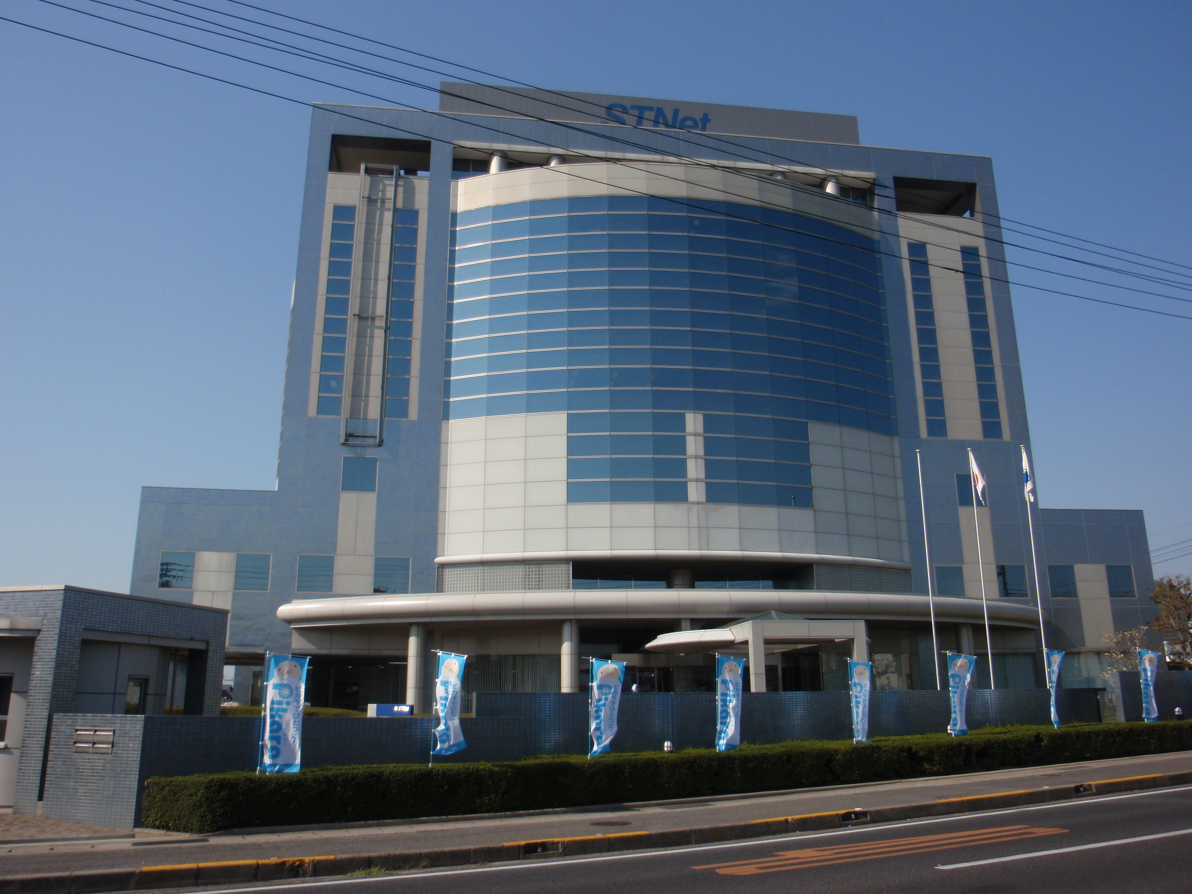 香川県高松市にある株式会社STNetの本社。